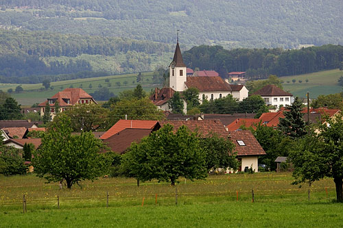 Wahlen